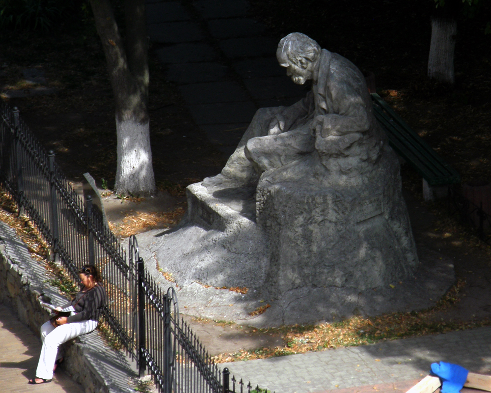 памятник Шевченко в музее Кавалеридзе